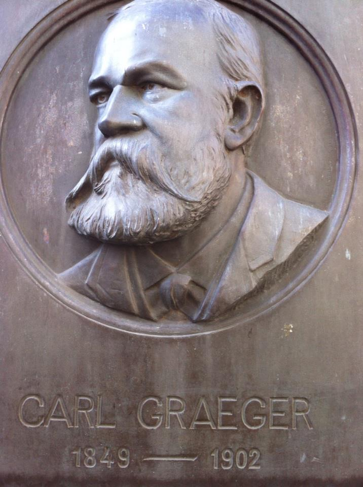 Carl Graeger Medaillon 1849-1902, Bingen am Rhein